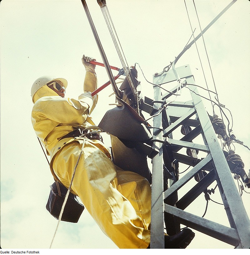 Original image description from the Deutsche Fotothek Elektromonteur